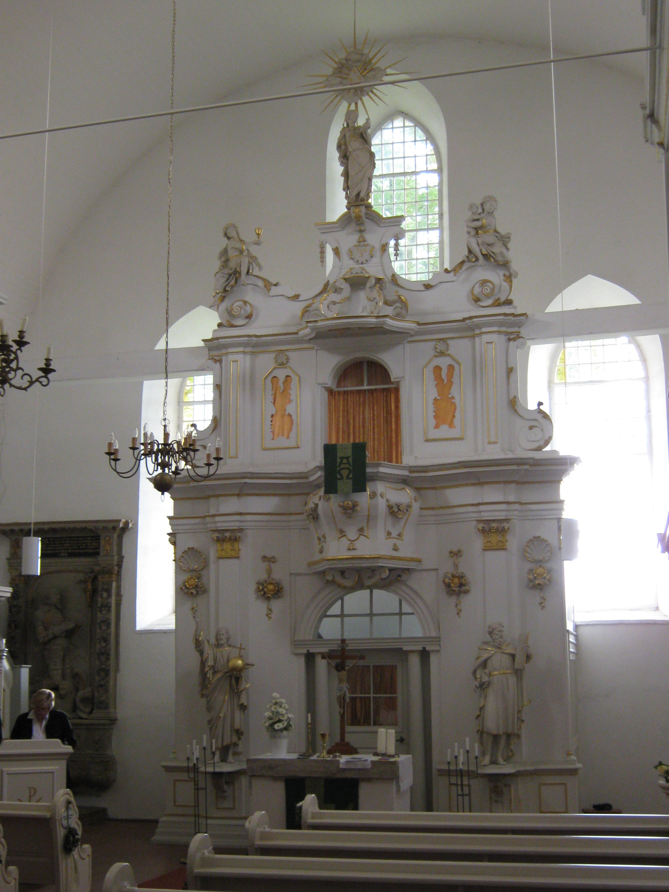 Inneres der Bartholomäi-Kirche in Dornheim im Ilmkreis (Deutschland), Trauungskirche von Johann Sebastian Bach